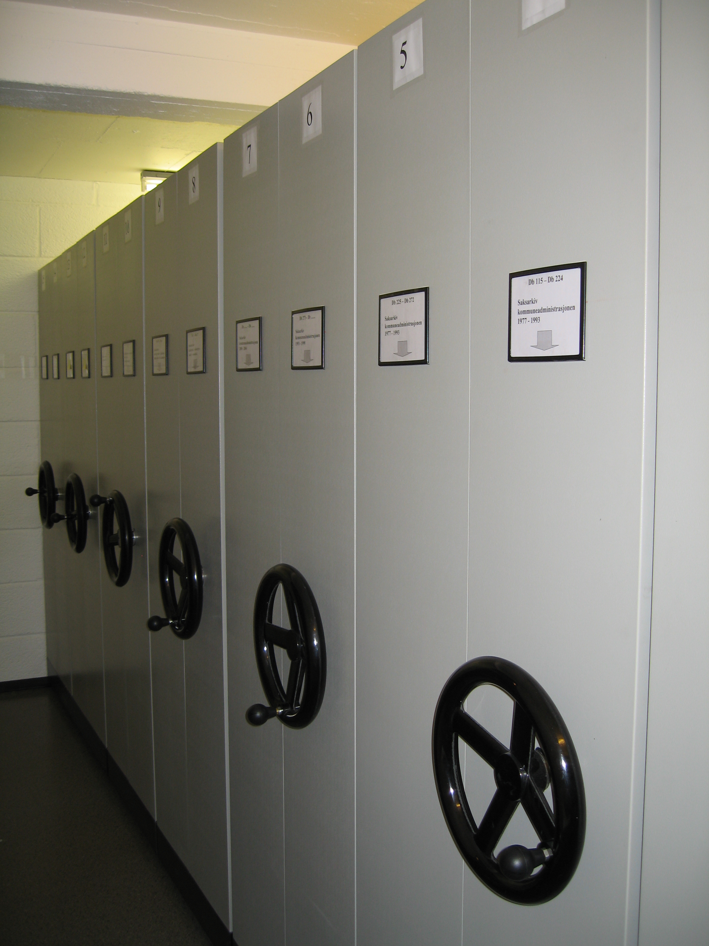 Arkivmateriale